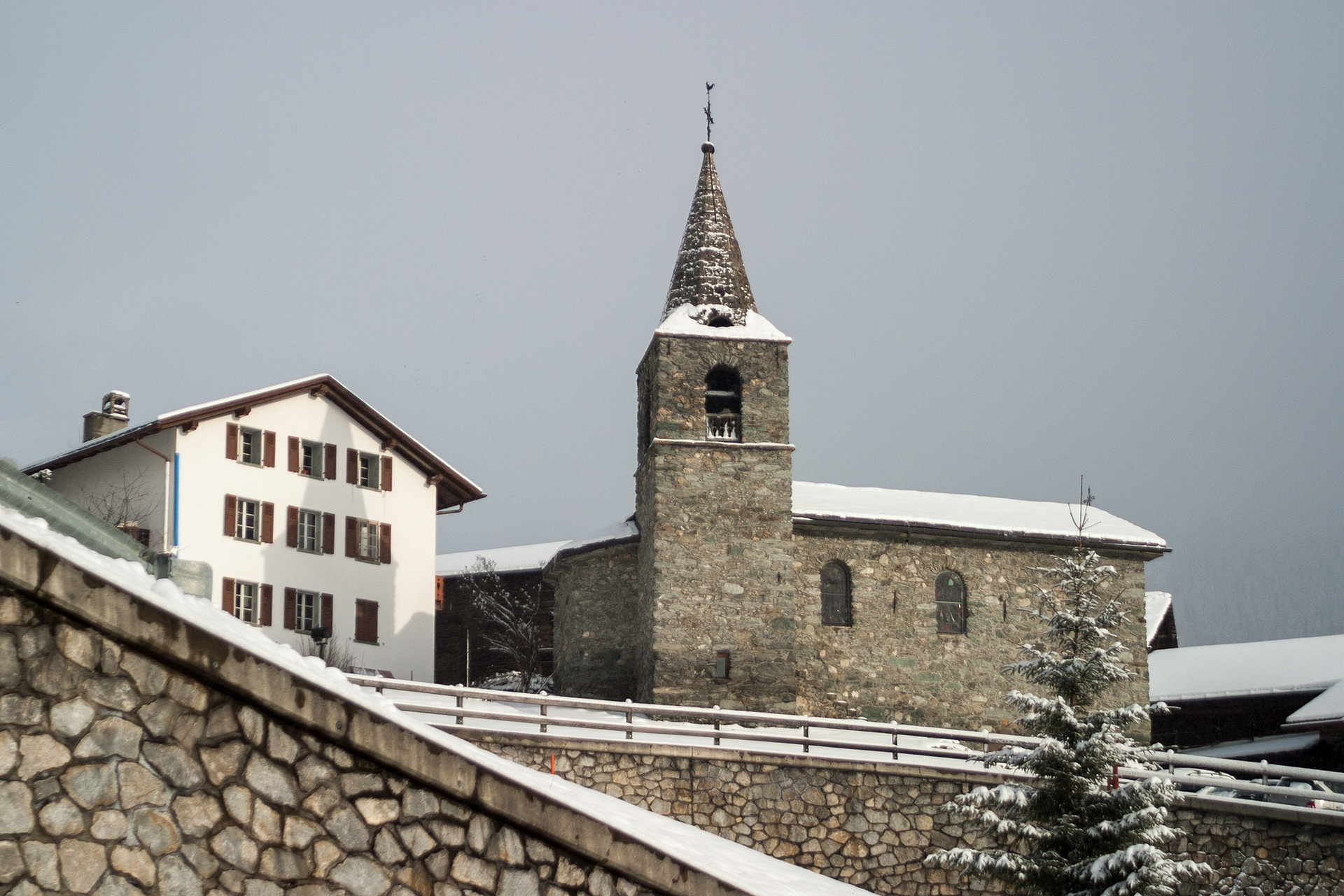 Alte Kirche in Verbier (VS)